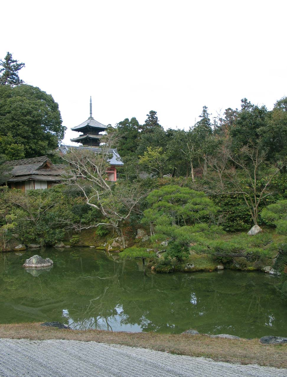 Jardin et pagode Ninna-ji - Kyōto / Garden and pagoda Ninna-ji - Kyoto